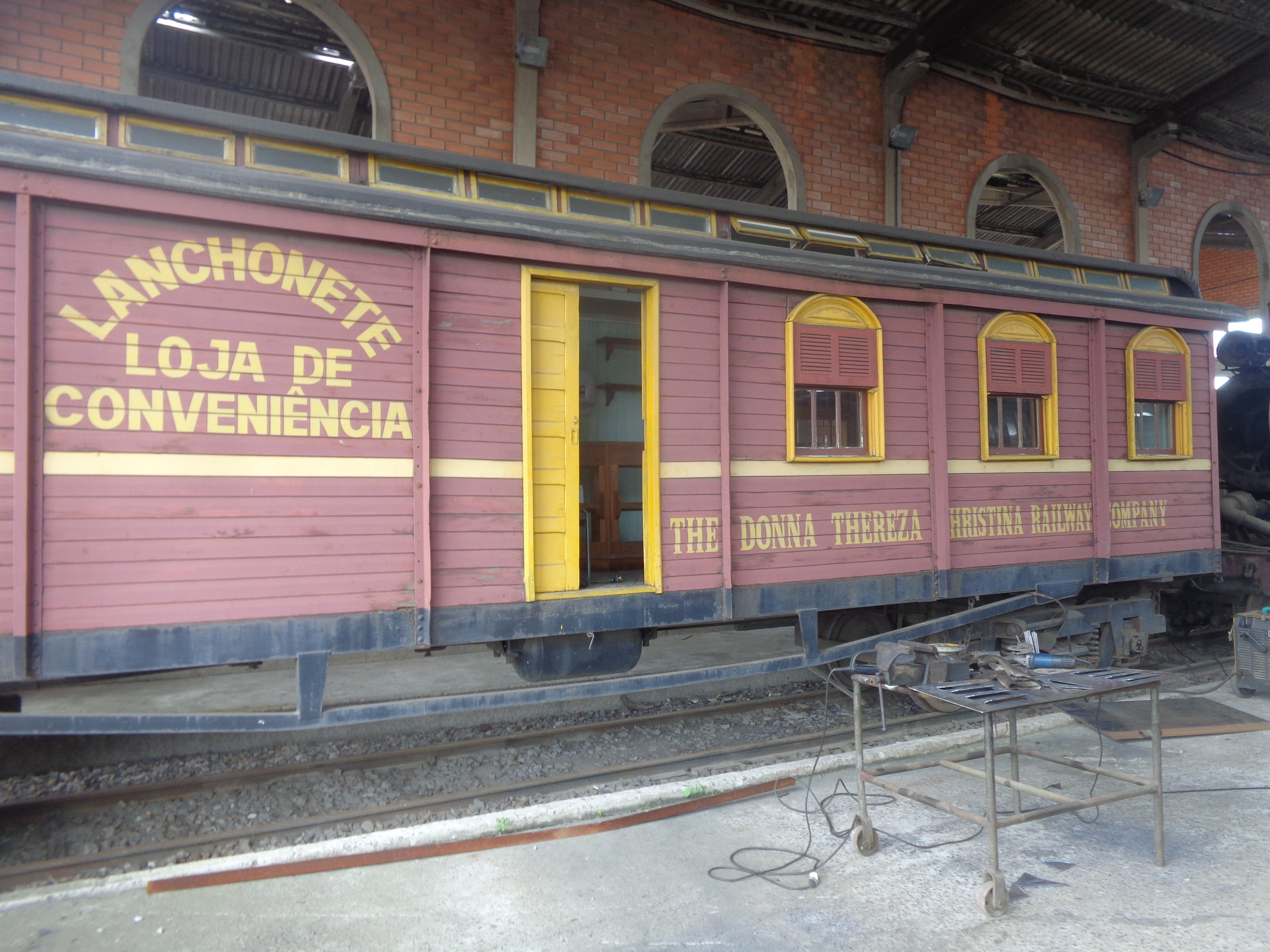 Vagão Lanchonete da Estrada de Ferro Donna Theresa Cristina (EFDTC), acervo do Museu Ferroviário de Tubarão